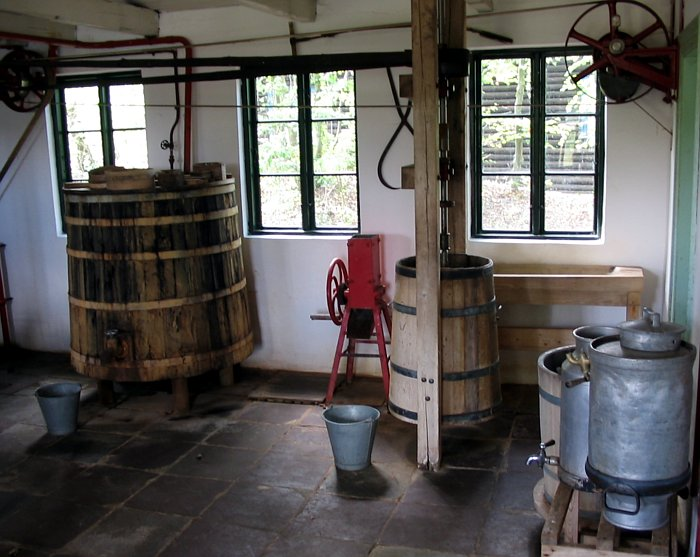 Hjerl Hede Mejeriet